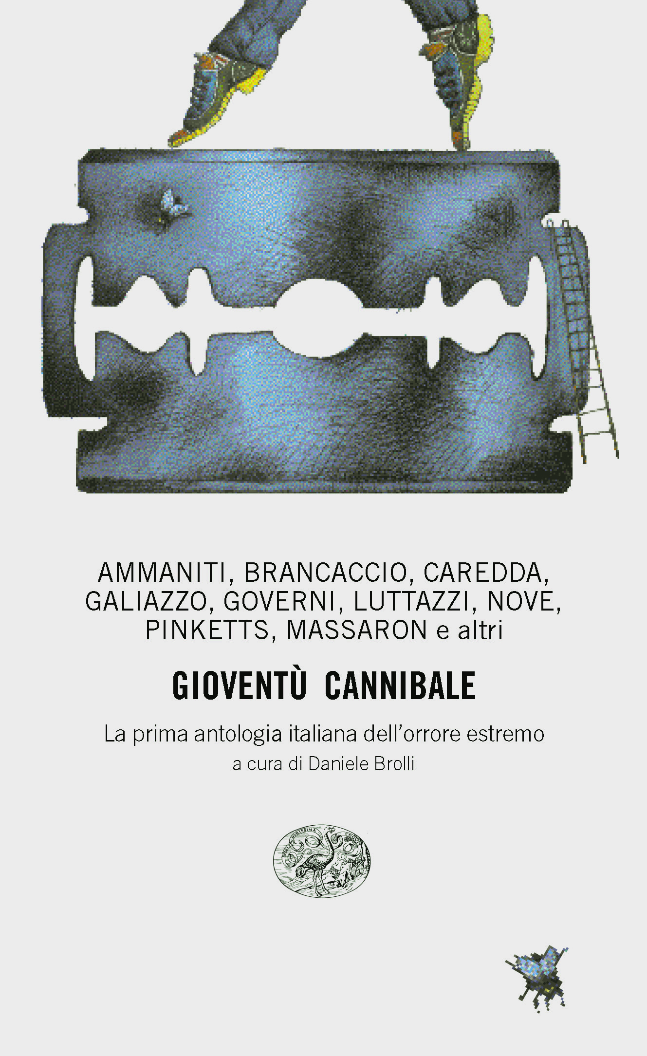 Copertina del volume Gioventù cannibale, antologia di racconti horror italiani: è tra i primi titoli della collana Einaudi Stile Libero creata nel 1995.